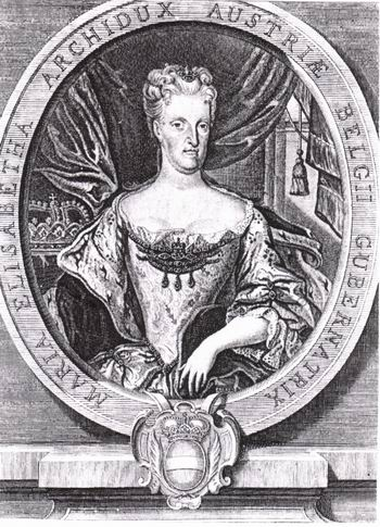 Maria Elisabeth von Österreich (1680–1741), Statthalterin der österreichischen Niederlanden und Tochter von Kaiser Leopold I. von Österreich